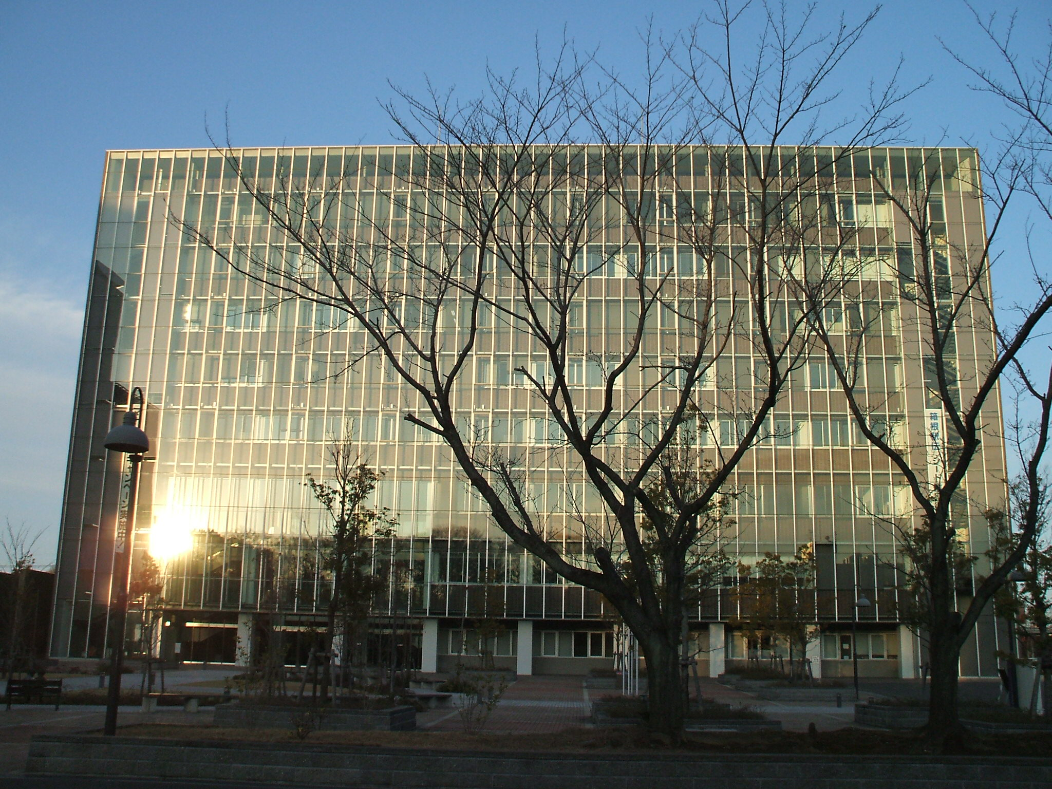 中央学院大学本館（中央学院100周年大学記念館）